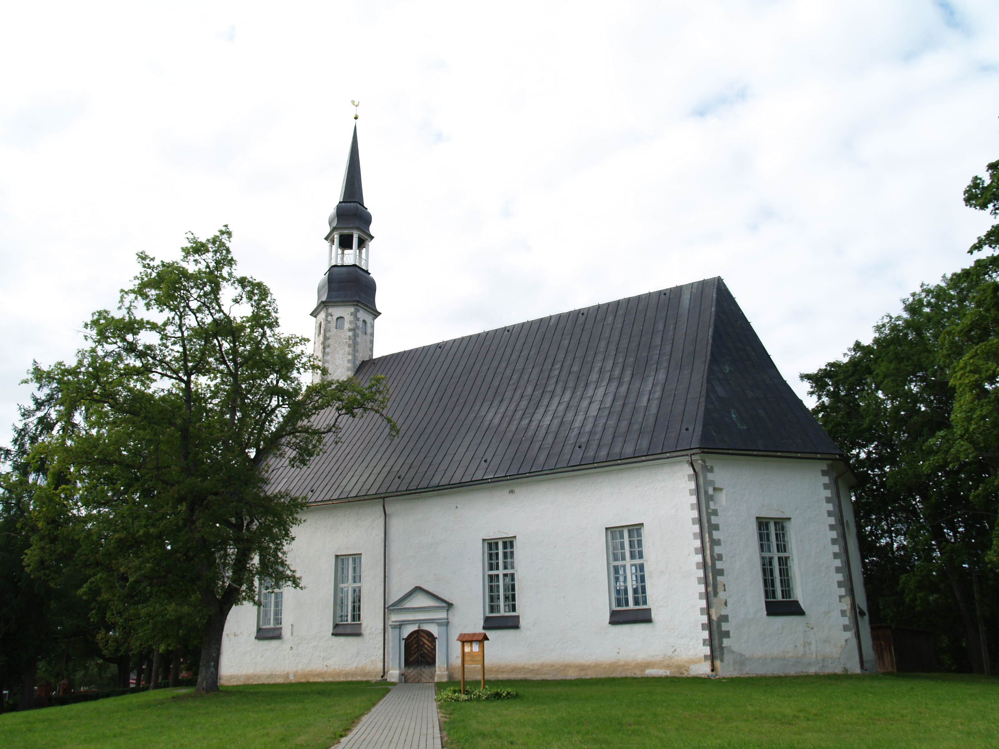 Matīši kirik